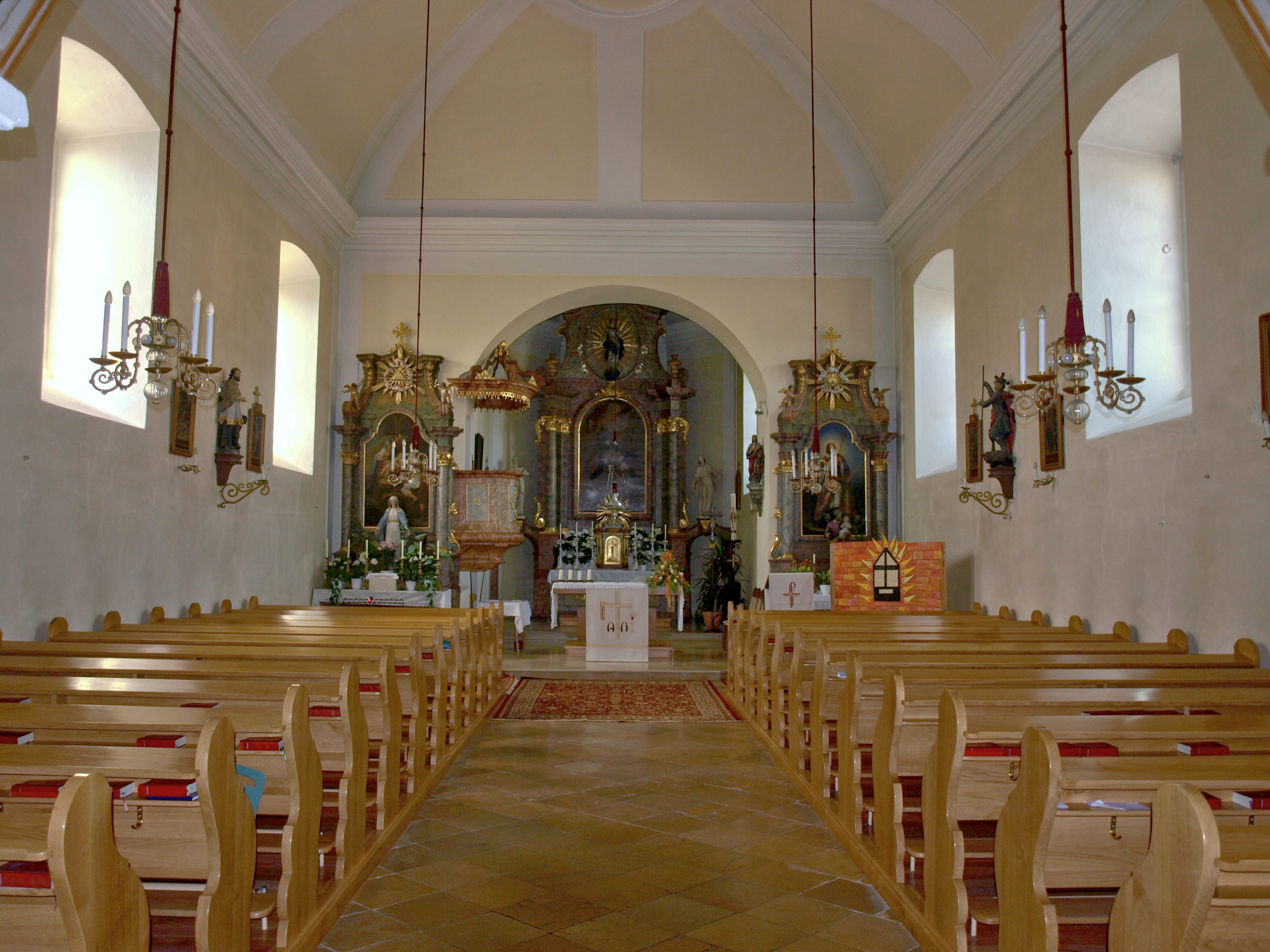 Kath. Pfarrkirche hl. Johann Nepomuk und Kriegerdenkmal